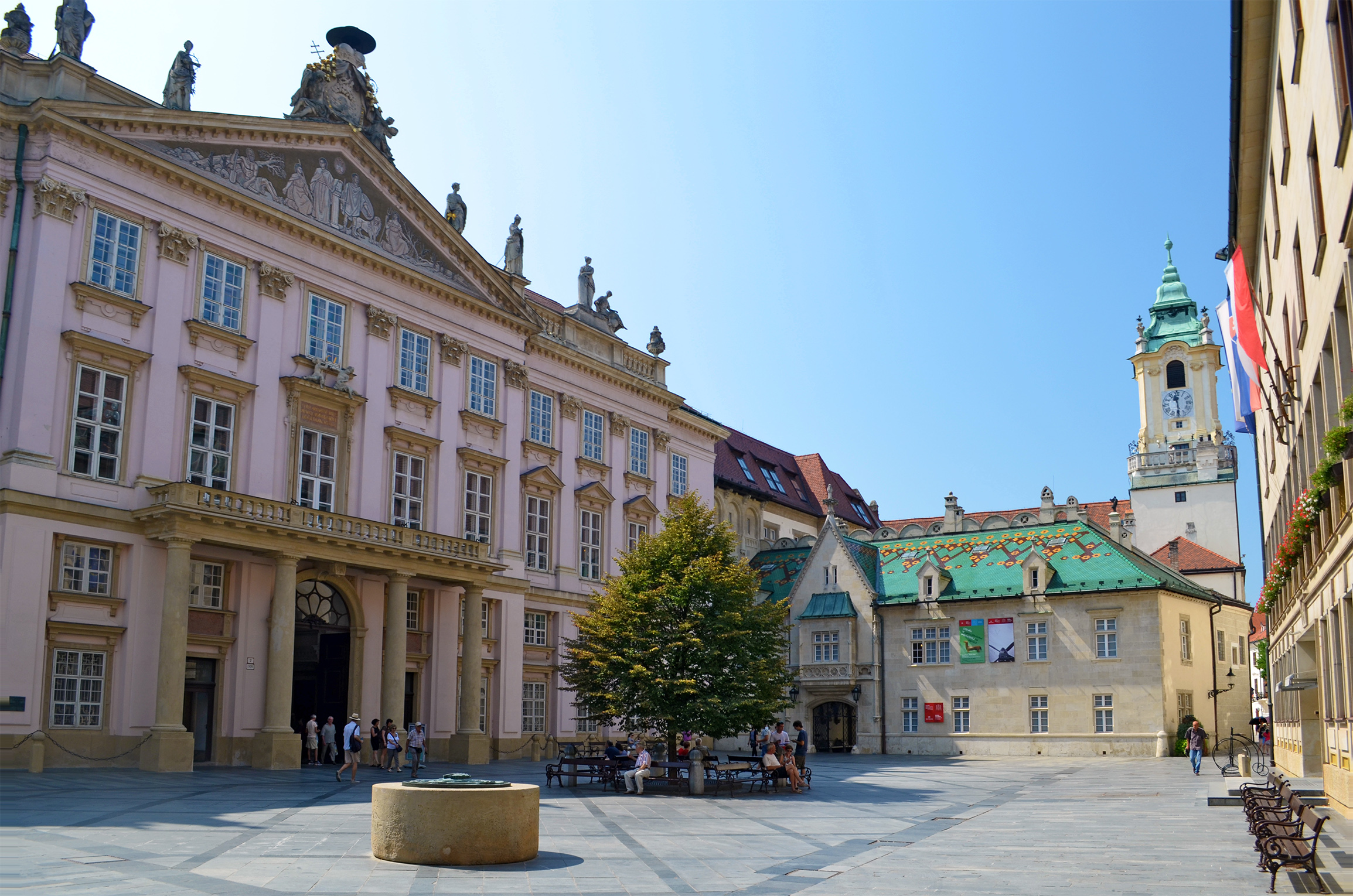 Архиепископский дворец